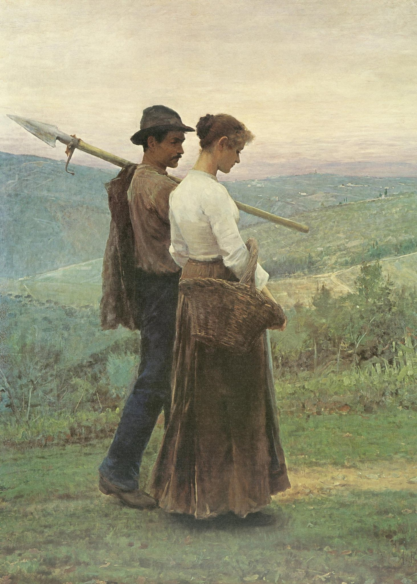 Tableau de 1892 du peintre italien Arturo Faldi (1856-1911)